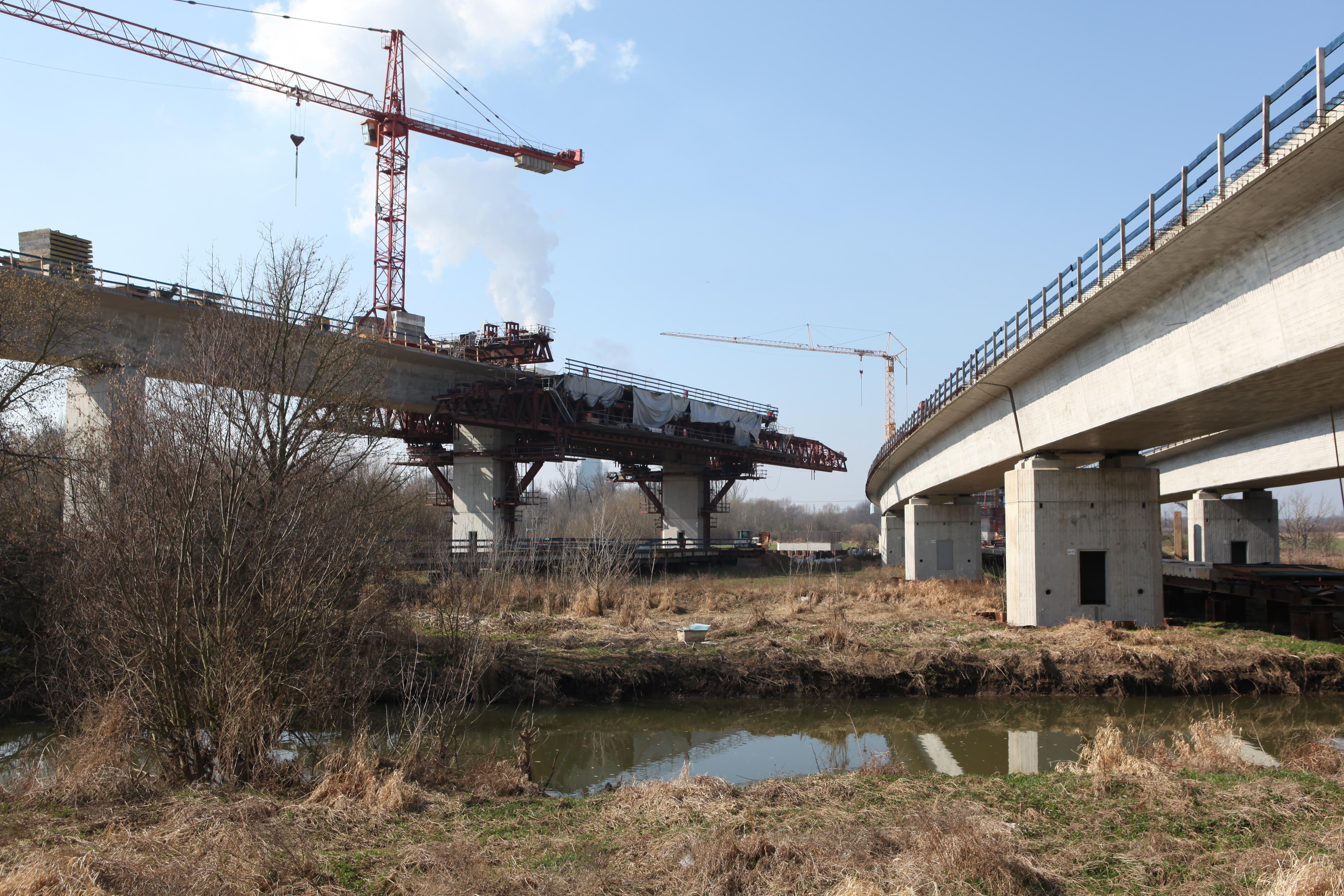 Saale-Elster-Talbrücke bei Halle in Sachsen-Anhalt